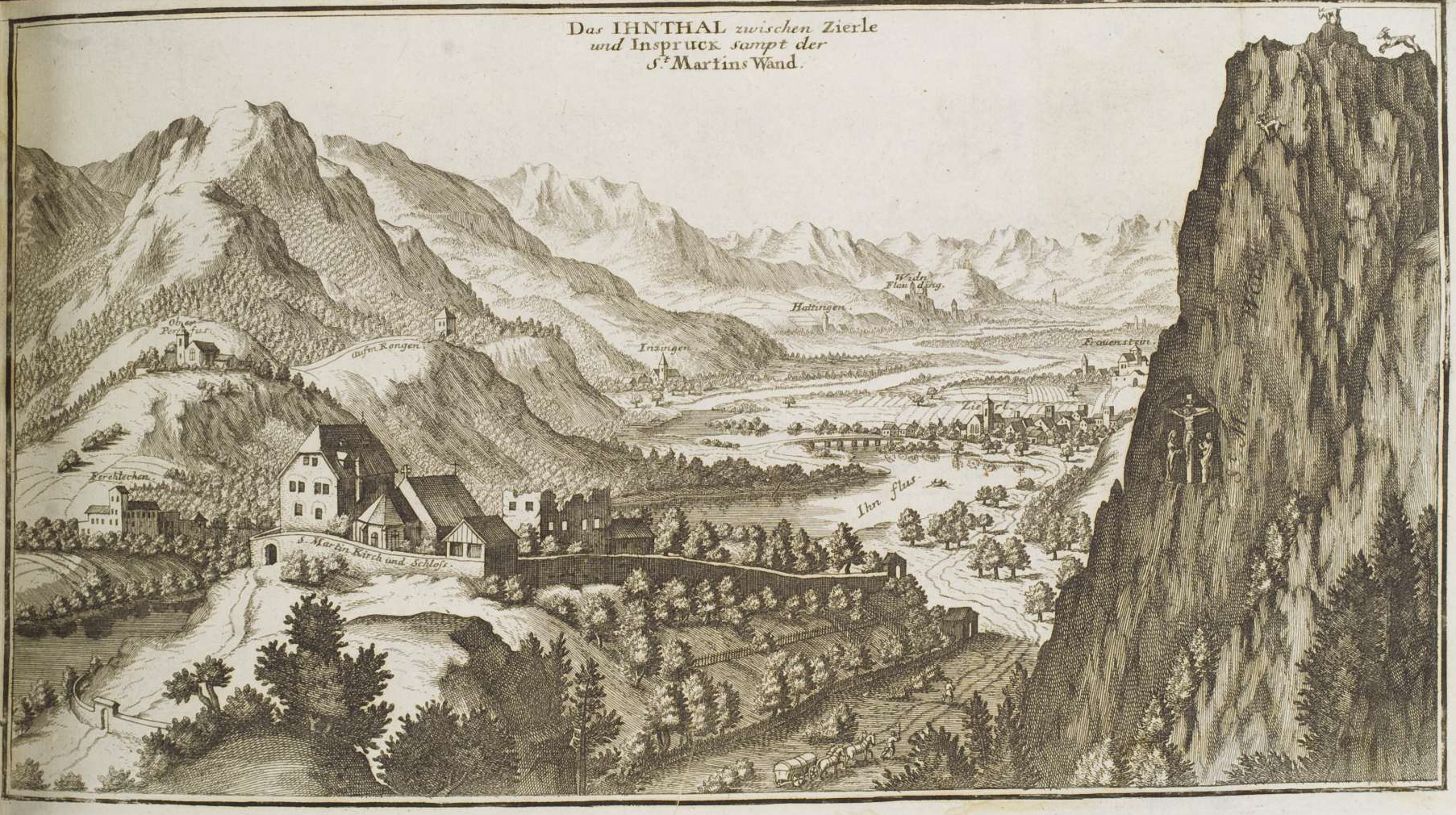 Curioses Staats und Kriegs Theatrum Dermahliger Begebenheiten im Tyrol : durch Unterschiedliche Geographische, Hydrographische, Topographische, Chronologische, Genealogische, Historische &c. Carten, Abrisse, und Tabellen Erlaeutert, Augspurg : Stridbeck, [ca. 1700] Ihntal